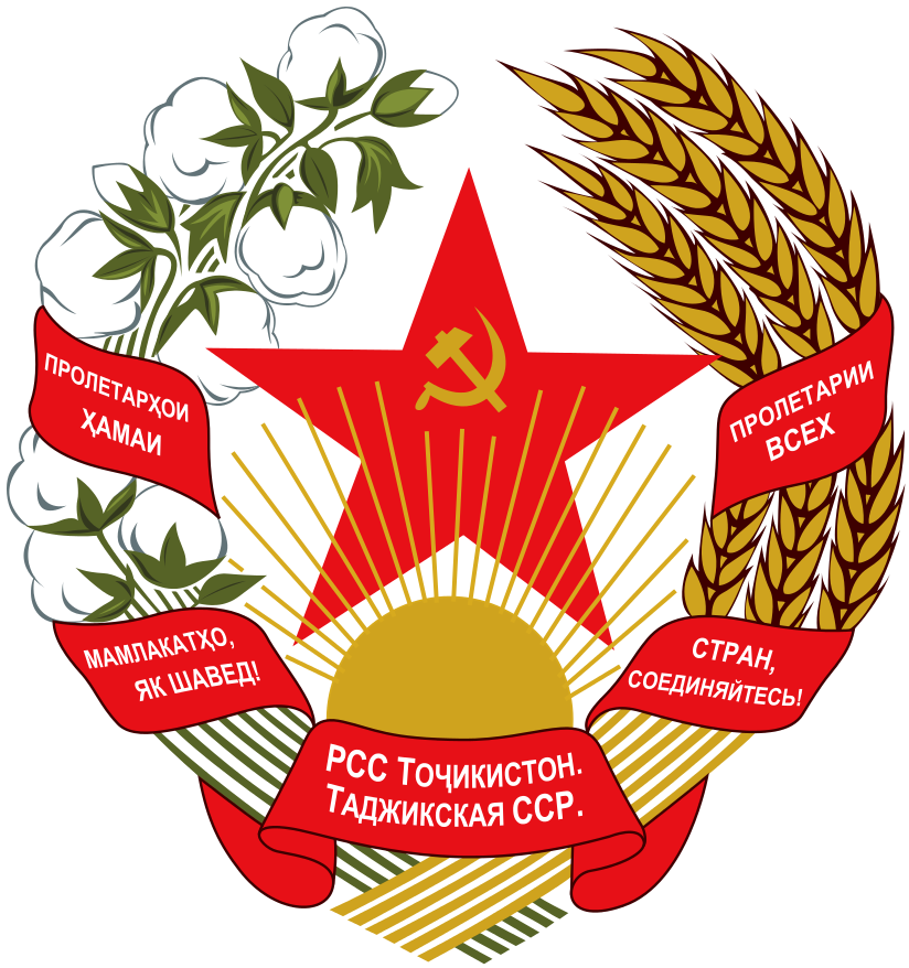 Emblema della Repubblica Socialista Sovietica Tajika